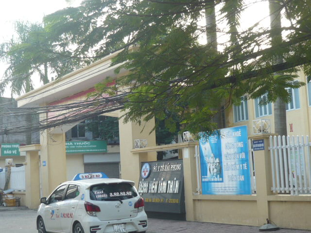 Bệnh viện Tâm Thần (tên dân gian vẫn gọi là "nhà thương điên", tọa lạc tại phường Đông Khê quận Ngô Quyền thành phố Hải Phòng.